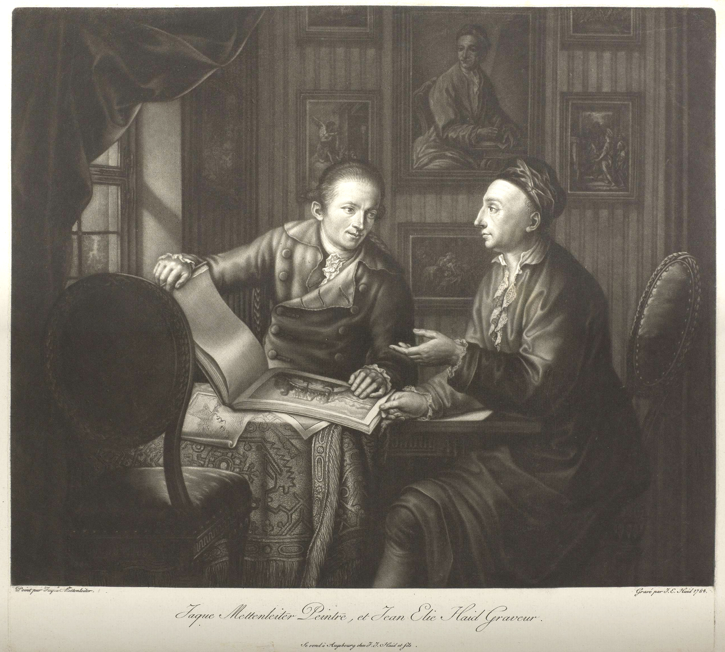 Links: Der Maler Johann Jakob Mettenleiter (* 9. August 1750; † 25. Februar 1825). Rechts: Der Kupferstecher Johann Elias Haid (* 1739 in Augsburg; † 5. April 1809)